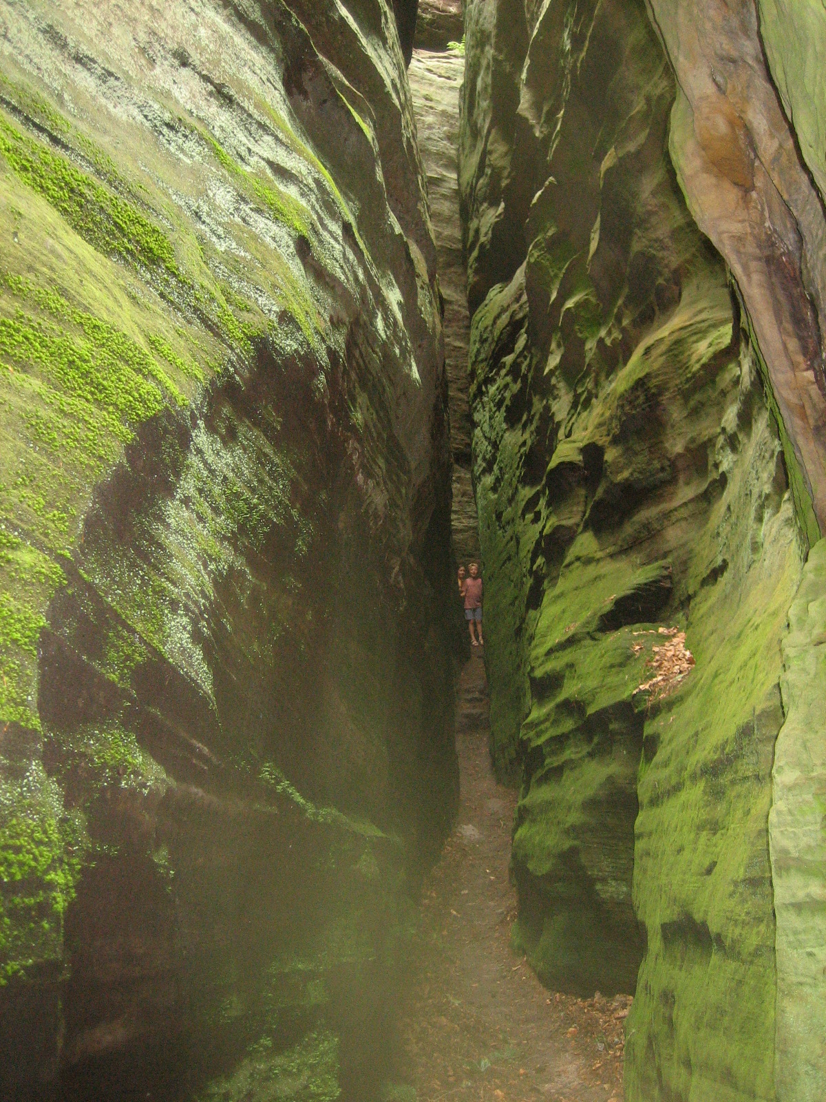 D'Siweschlëff bei Bäerdref